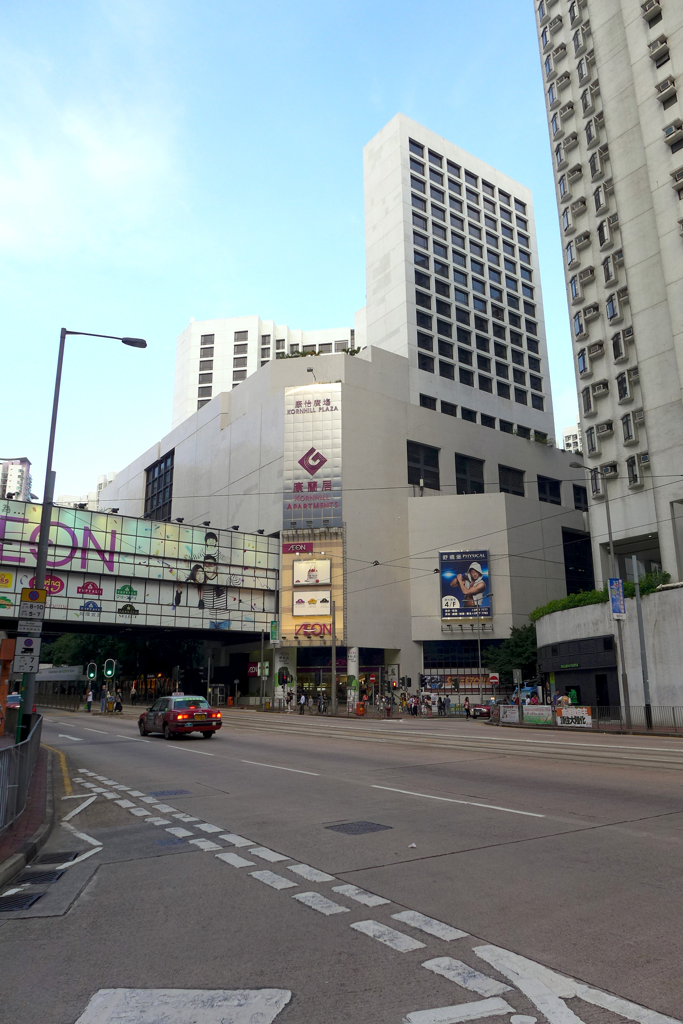 Kornhill Plaza